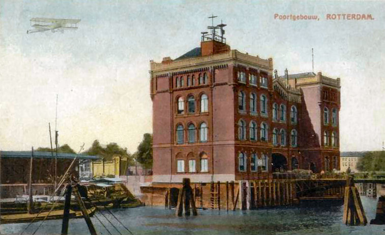 Het Poortgebouw in Rotterdam. Afbeelding van prentbriefkaart uit 1915, maker onbekend